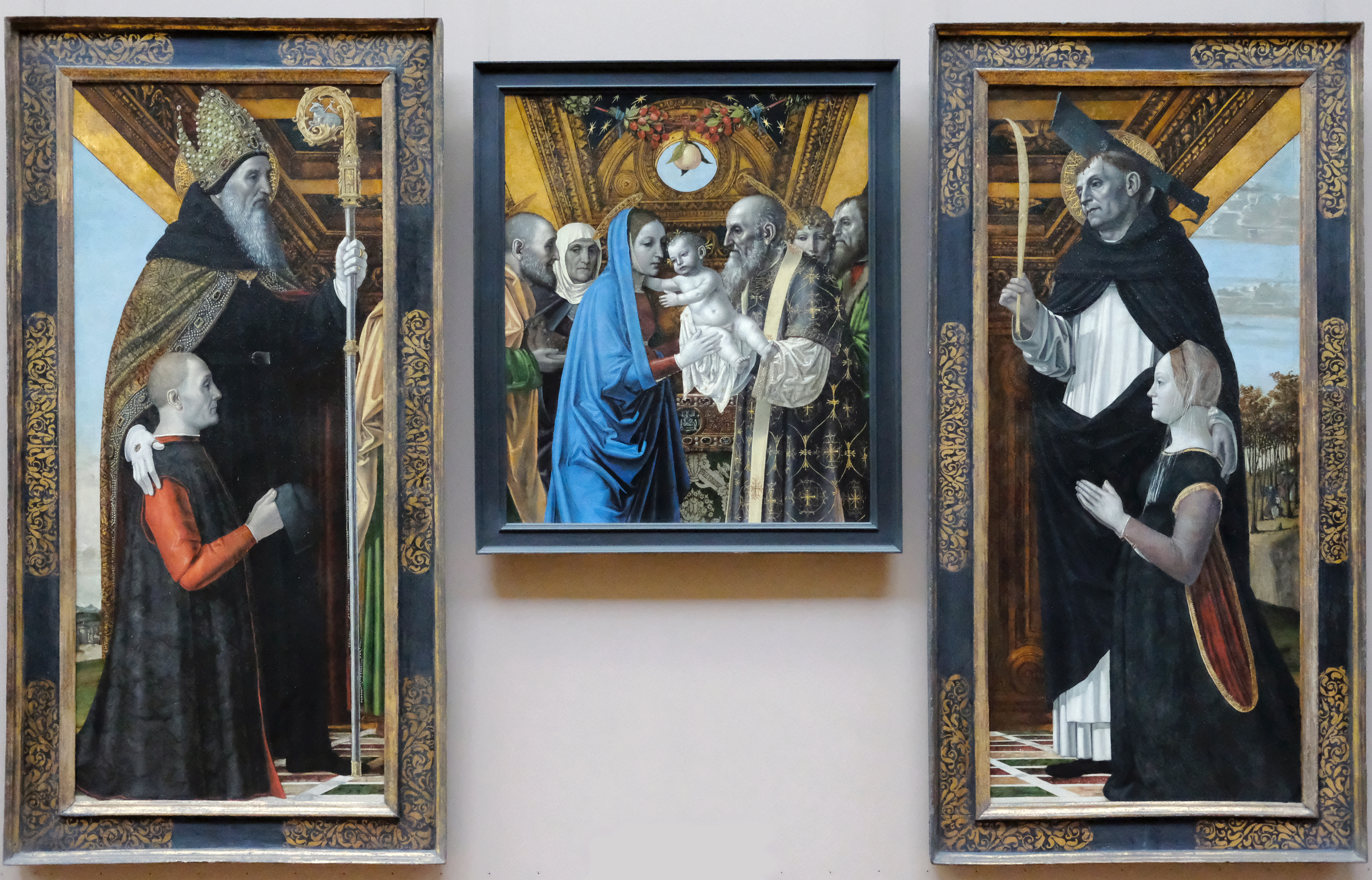 Fragment de la partie centrale d'un retable découpé en trois panneaux distincts à une époque indéterminée ; les personnages (de la partie centrale) étaient initialement en pied comme St Augustin et St Pierre.